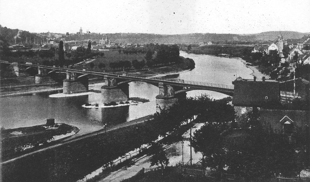 Blick auf die Eisenbahn-Neckarbrücke zwischen Jagstfeld und Wimpfen